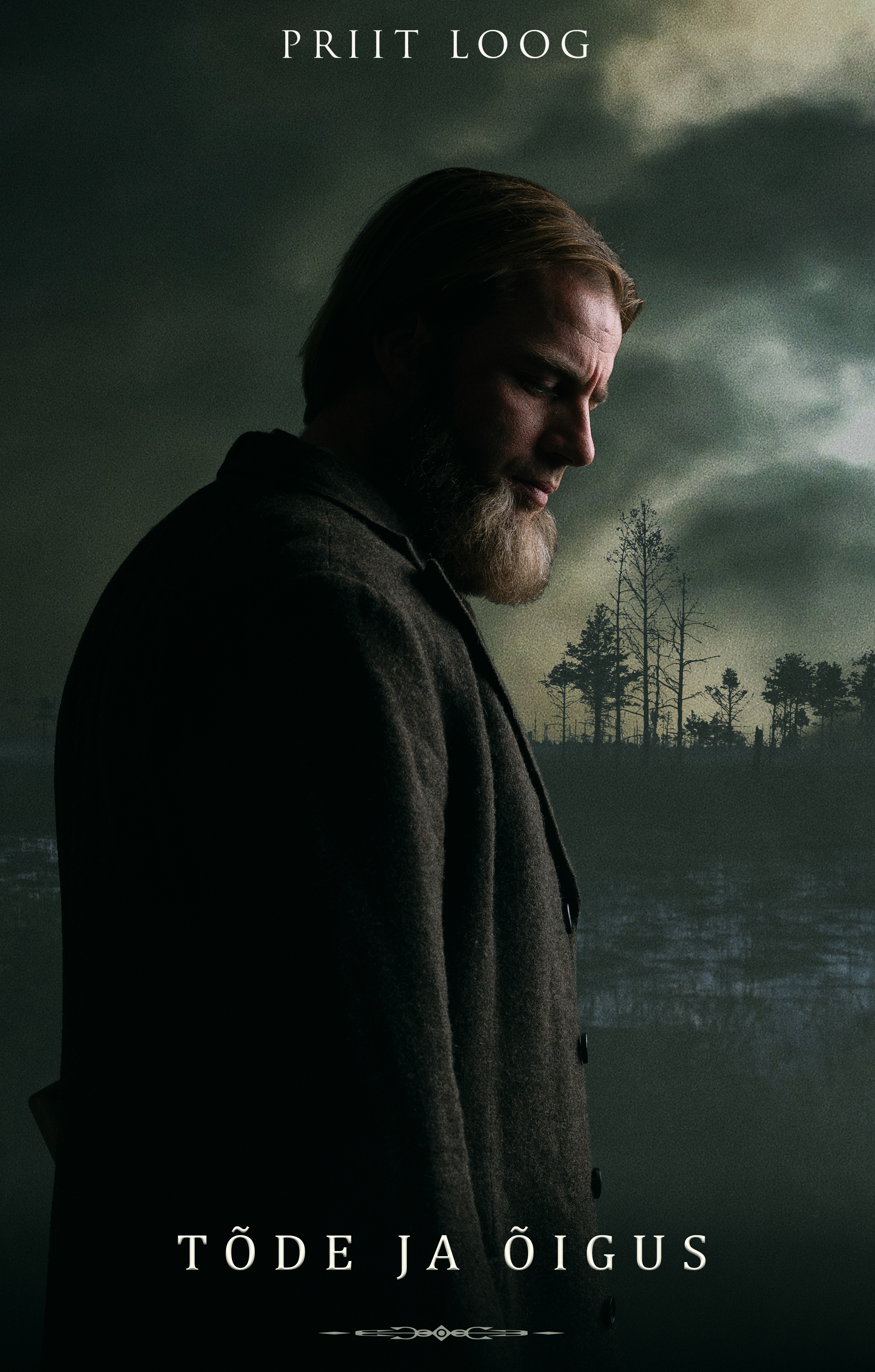 Priit Loog filmis "Tõde ja õigus" Andrese osatäitjana